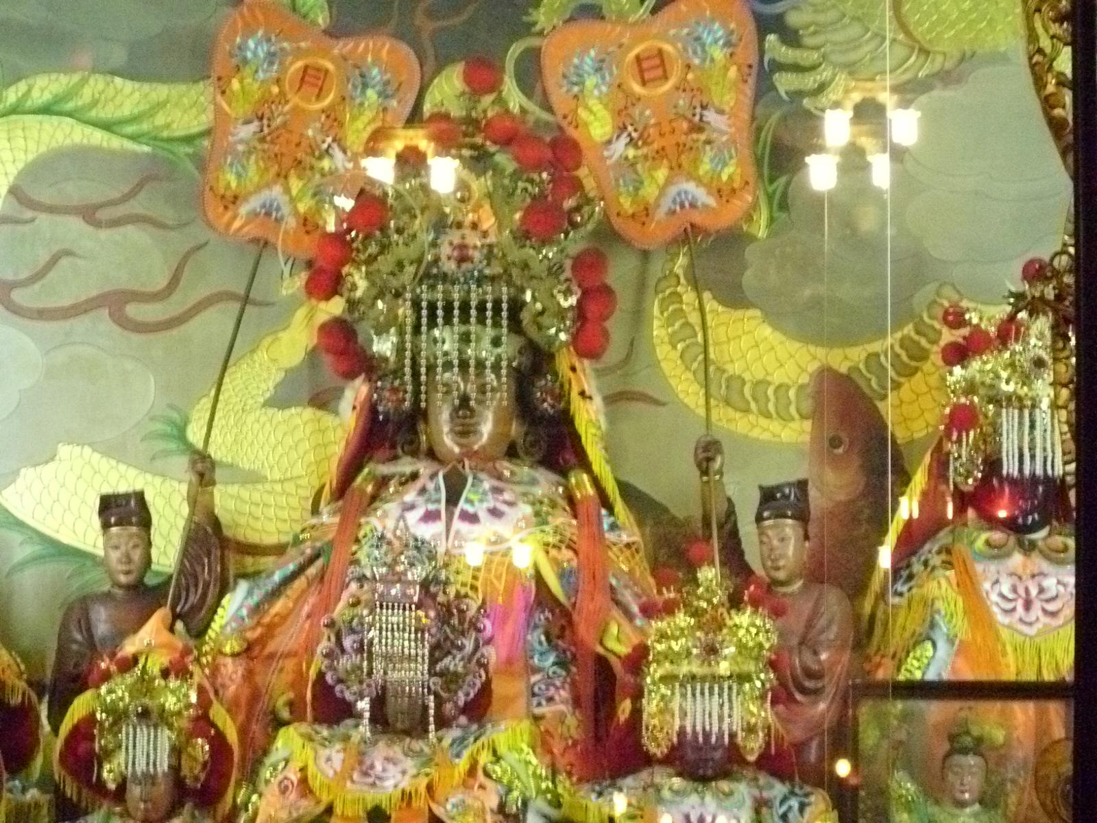 Yonĝing Temple, Daya District, Taichung.中文（台灣）: 台中大雅永興宮。